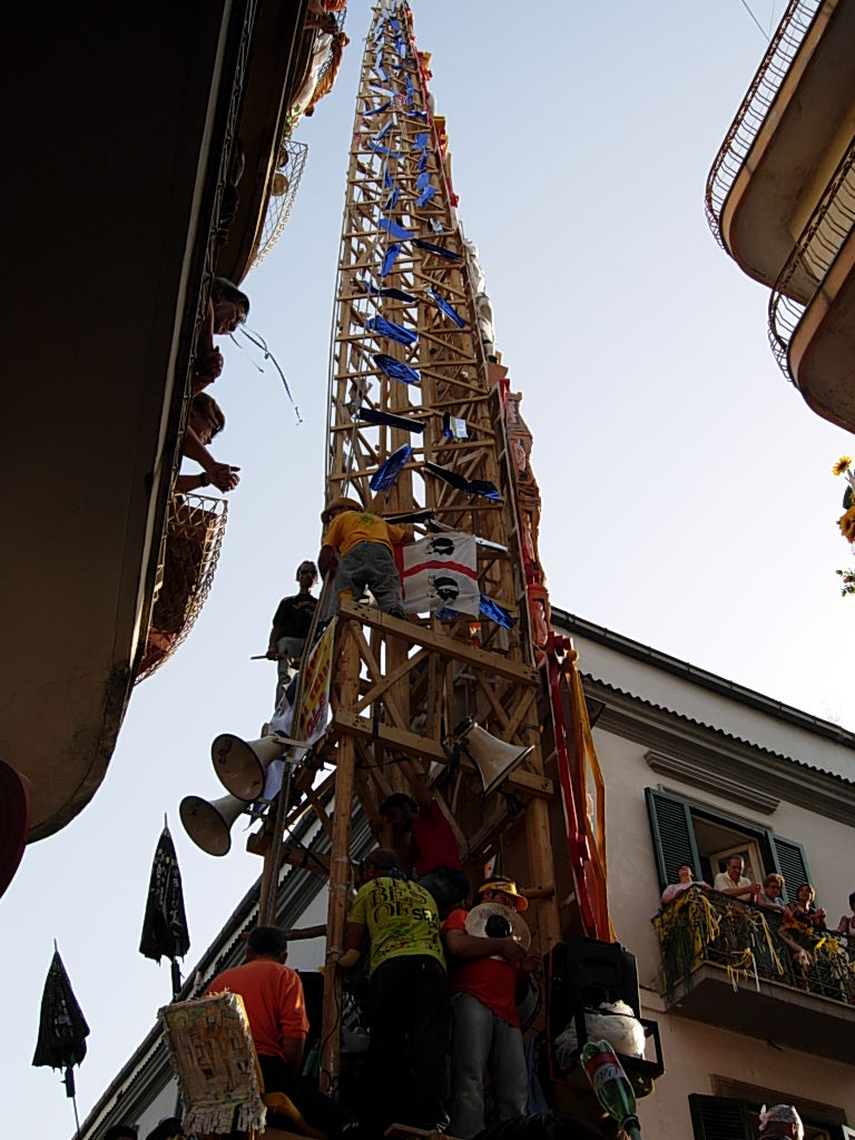 Festa dei Gigli di Barra 2019 Foto personale concessa dalla pagina Festa Dei Gigli By SavioGroup